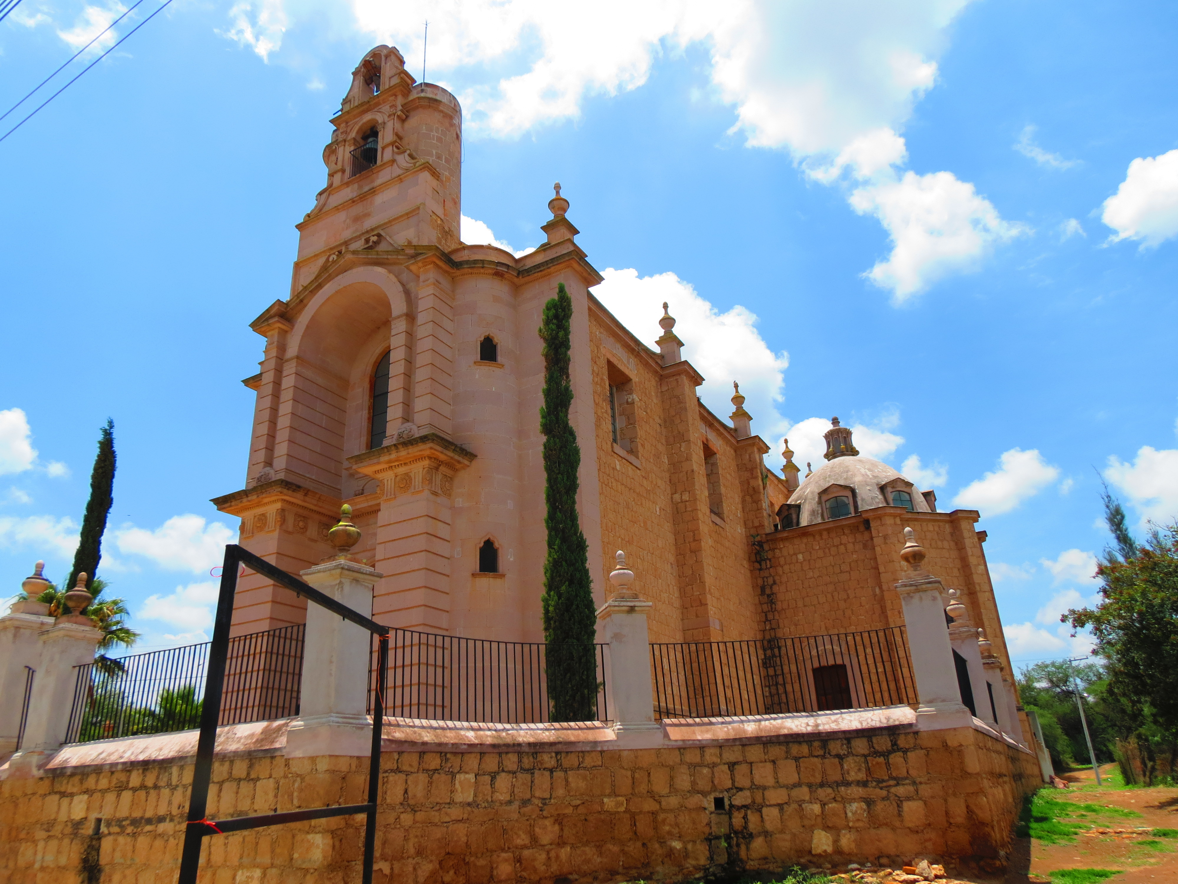 Templo de El Soyatal, El Colorado, Aguascalientes. Obra de Refugio Reyes Rivas